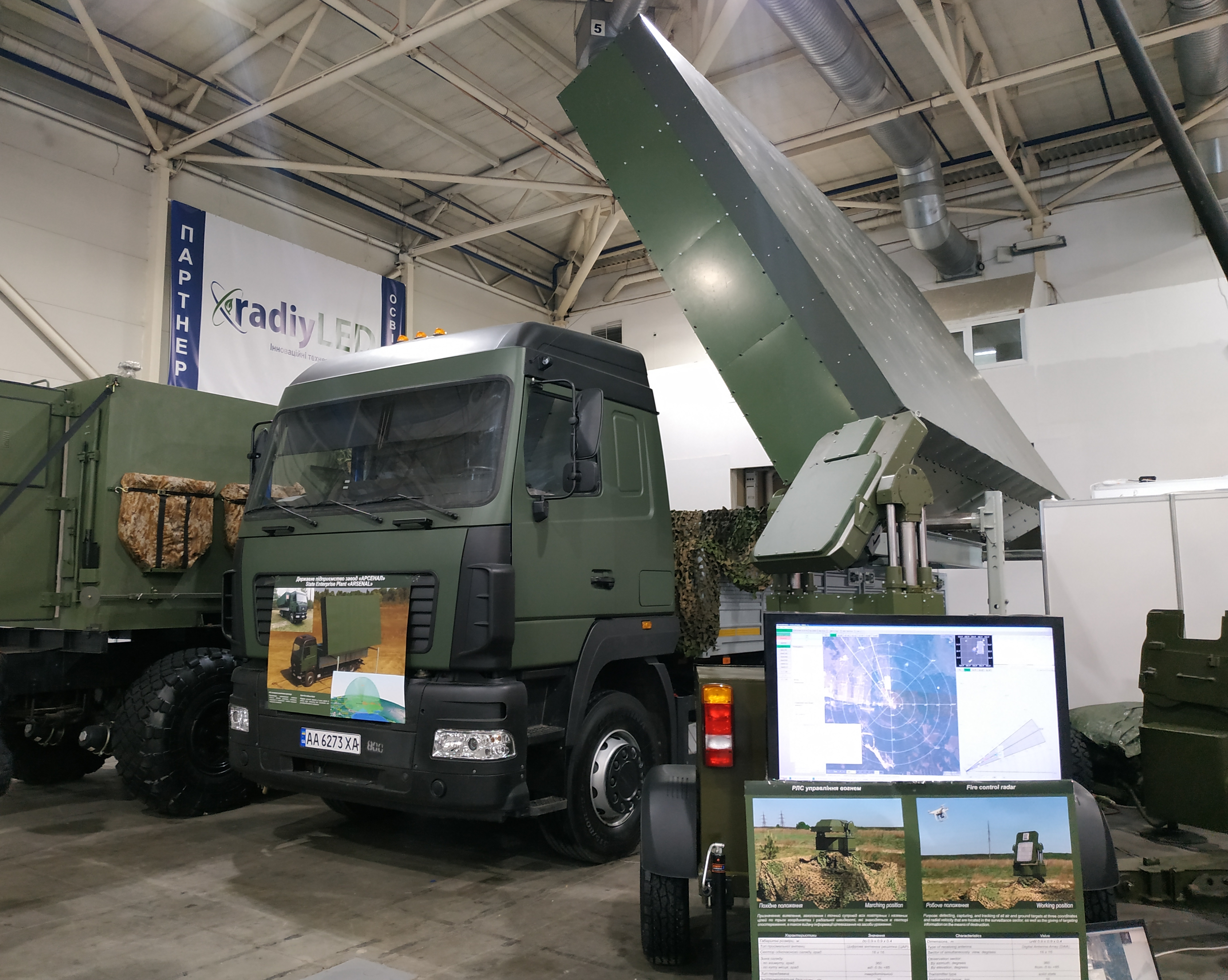 Мобильная трехкоординатная РЛС контроля космического пространства "Збруч" на шасси МАЗ-6312С9 производства завода "Арсенал". Выставка "Зброя та безпека", Киев, октябрь 2019 г.